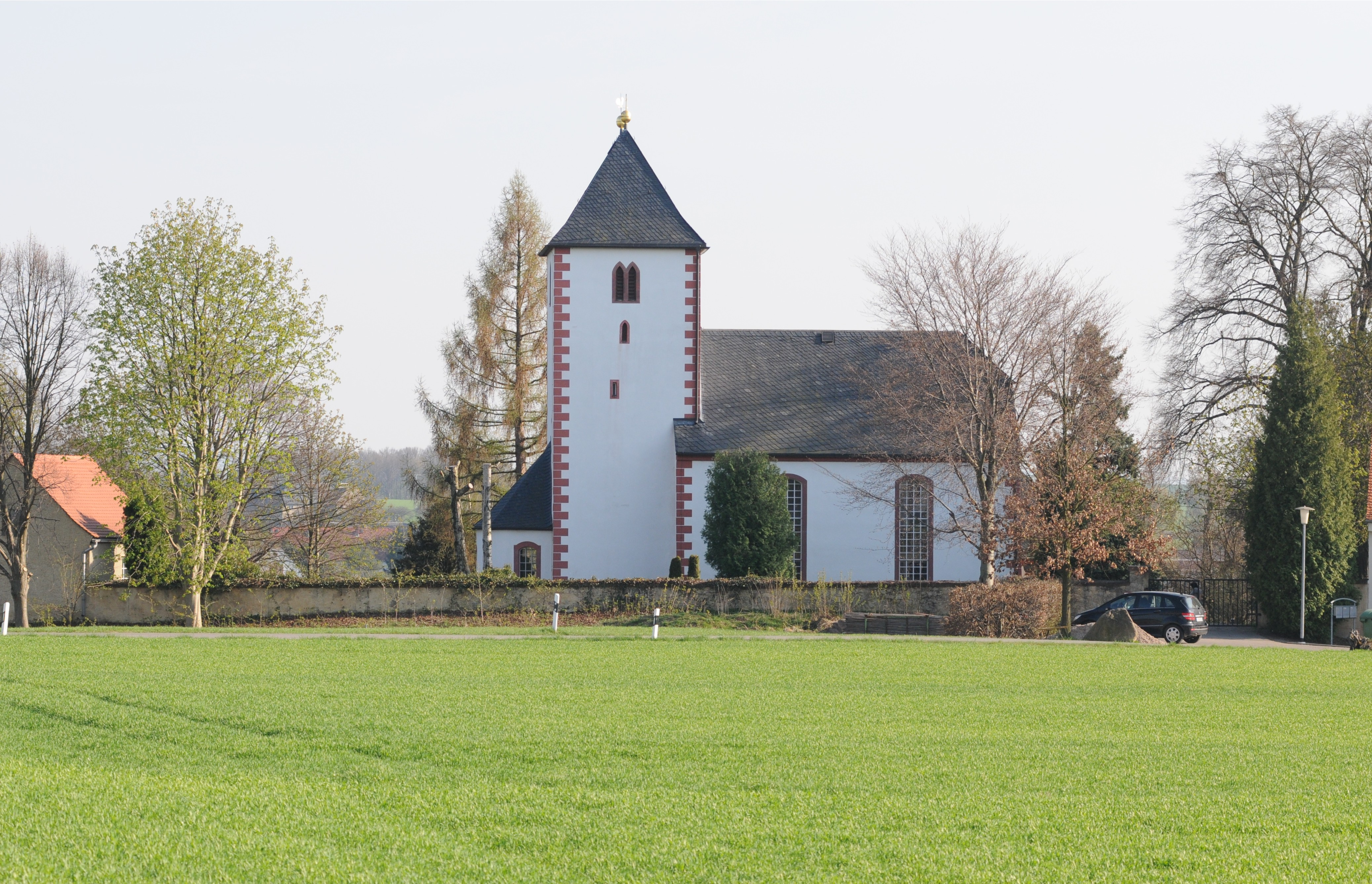 Kirche in Rathendorf (Sachsen, Deutschland)